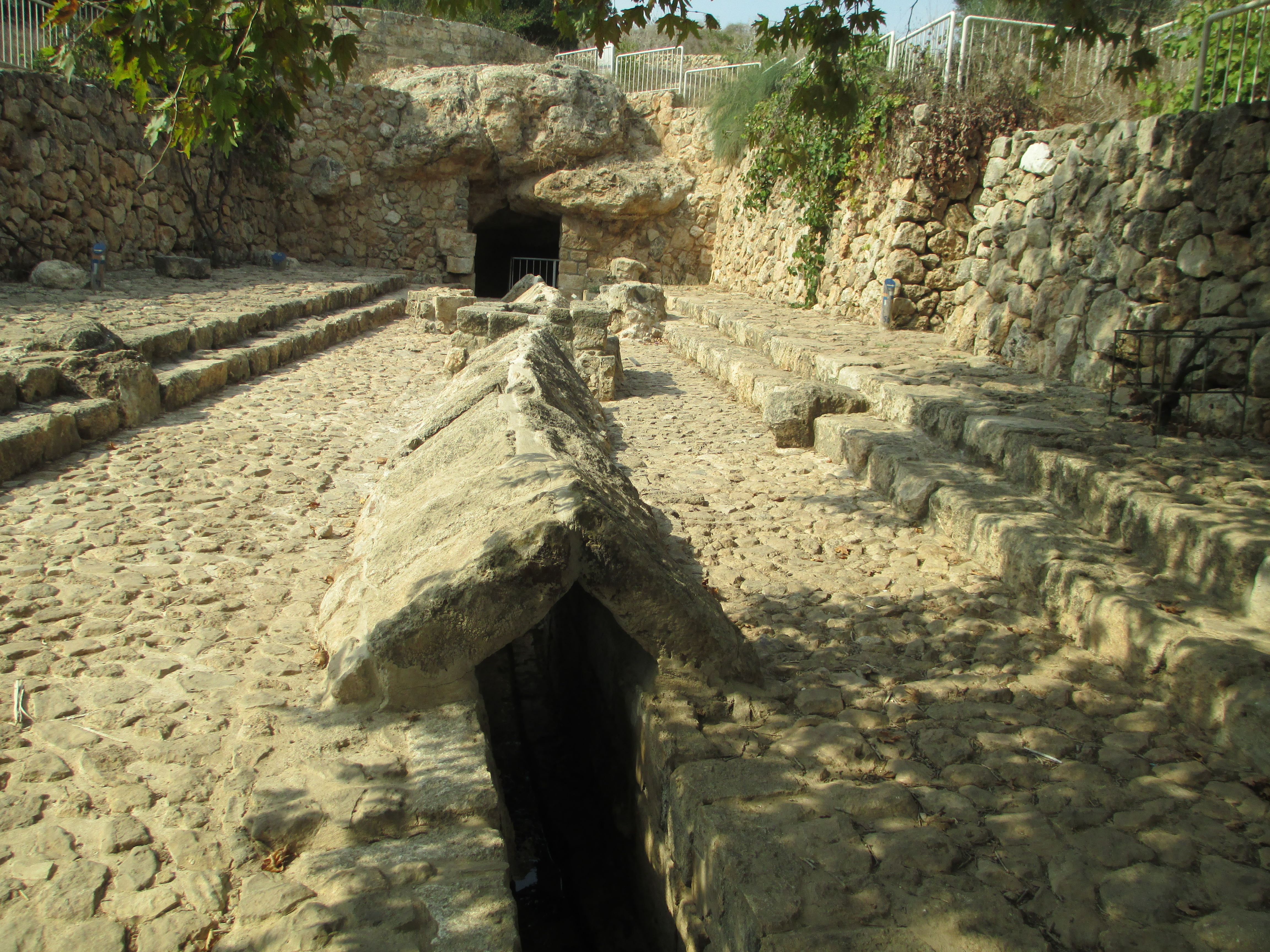 אמת מעיין עין צור